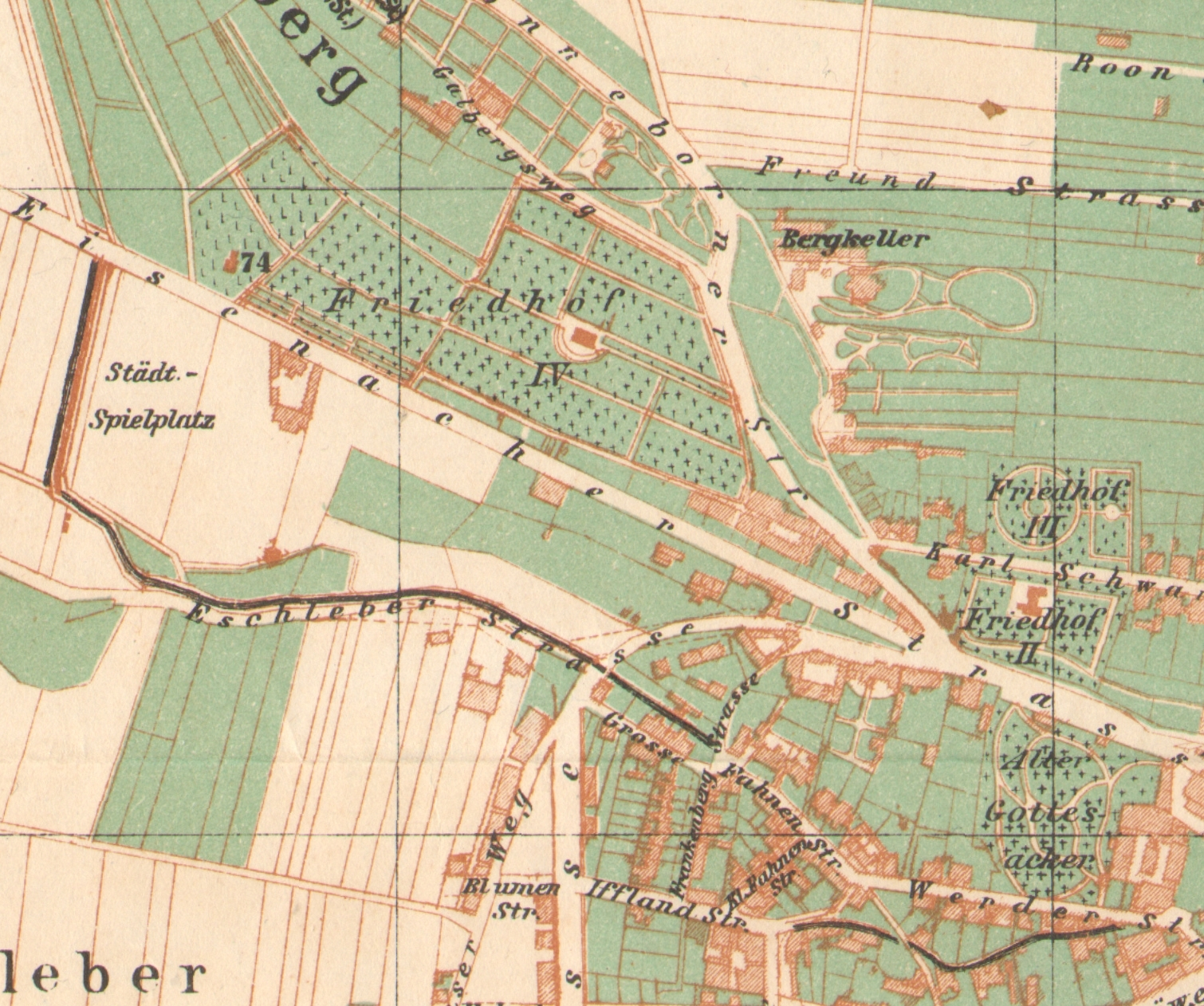 Ausschnitt des Stadtplans von Gotha Aus dem Jahr 1905